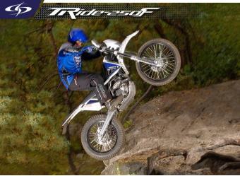 Une moto Scorpa T-Ride 250F en action.